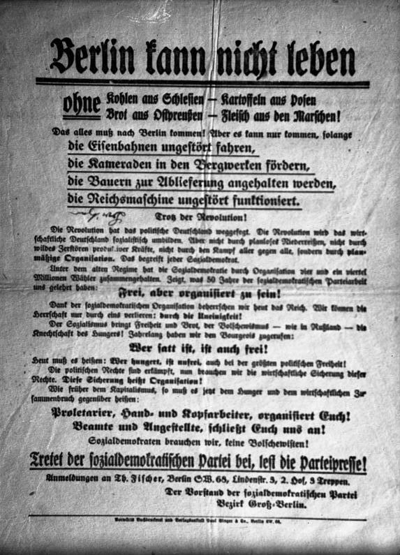 Berlin kann nicht leben ohne Kohlen aus Schlesien - Kartoffeln aus Posen Brot aus Ospreußen - Fleisch aus den Marschen!